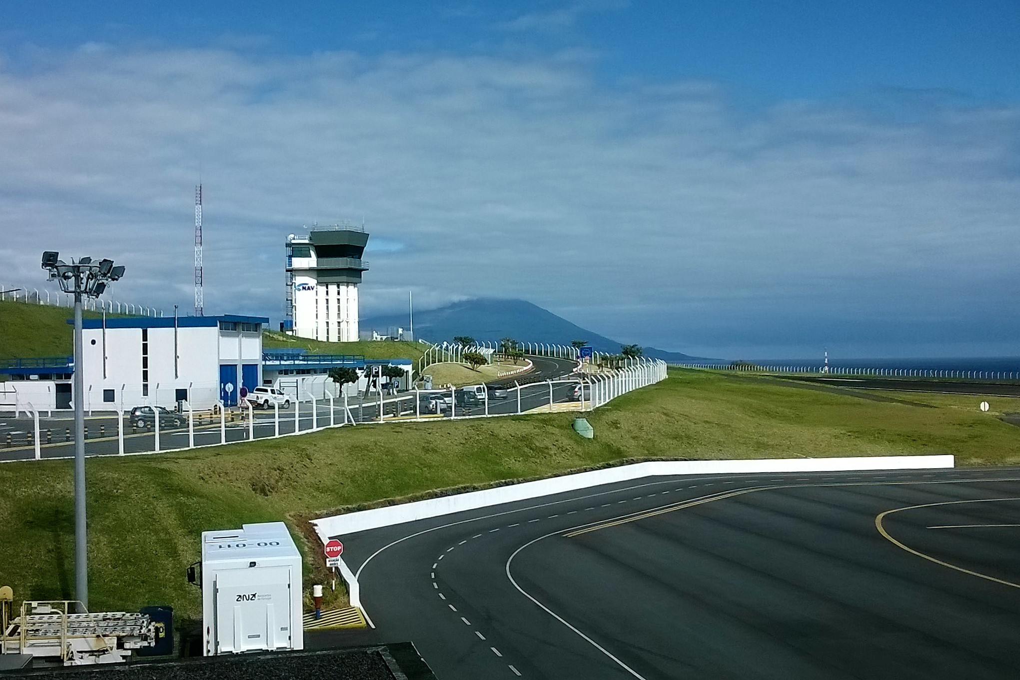 Aeroporto da Horta, ilha do Faial, Região Autónoma dos Açores: vista da torre de controlo.